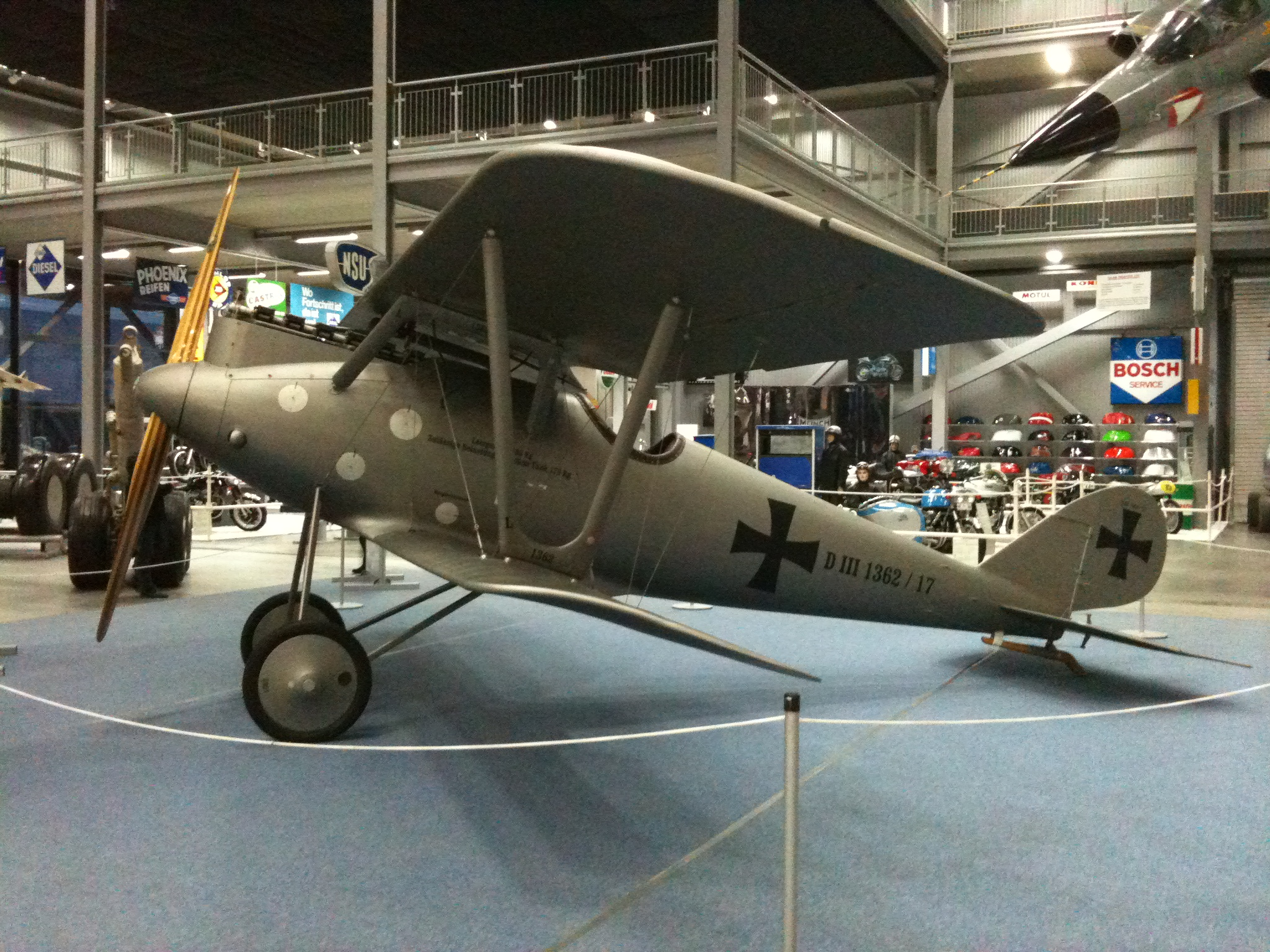 Pfalz D.III'ün, PFW’nin çıraklık atölyesinde yapılan, 1:1 modeli, Technik Museum, Speyer 2010